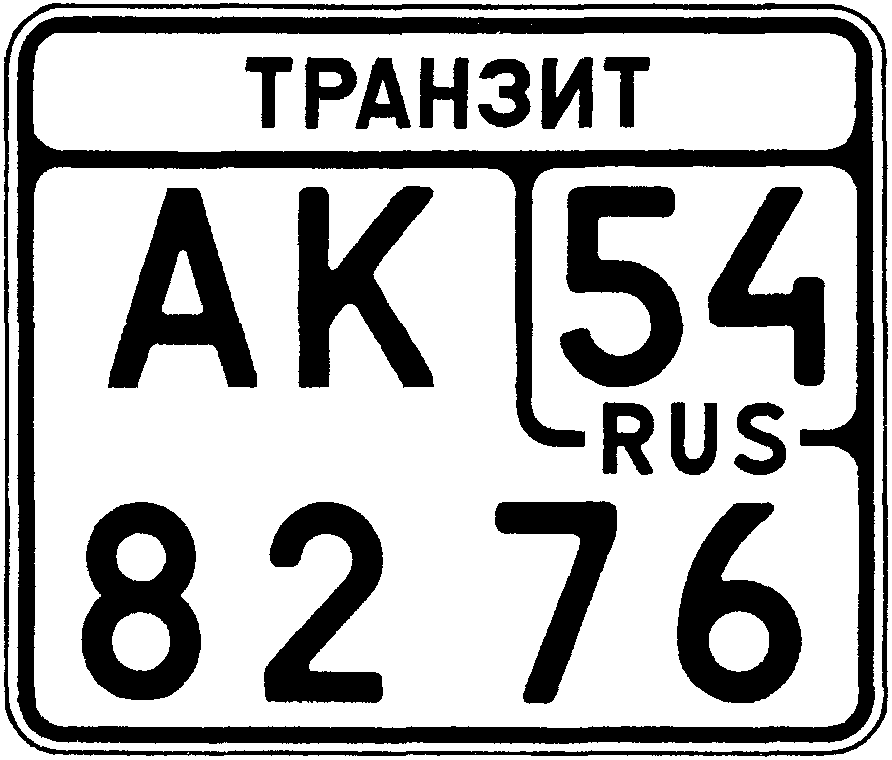 Номерной знак типа 16 по ГОСТ Р 50577-93. Предназначен для мотоциклов, мотороллеров, мопедов и снегоходов, временно допущенных к участию в дорожном движении.